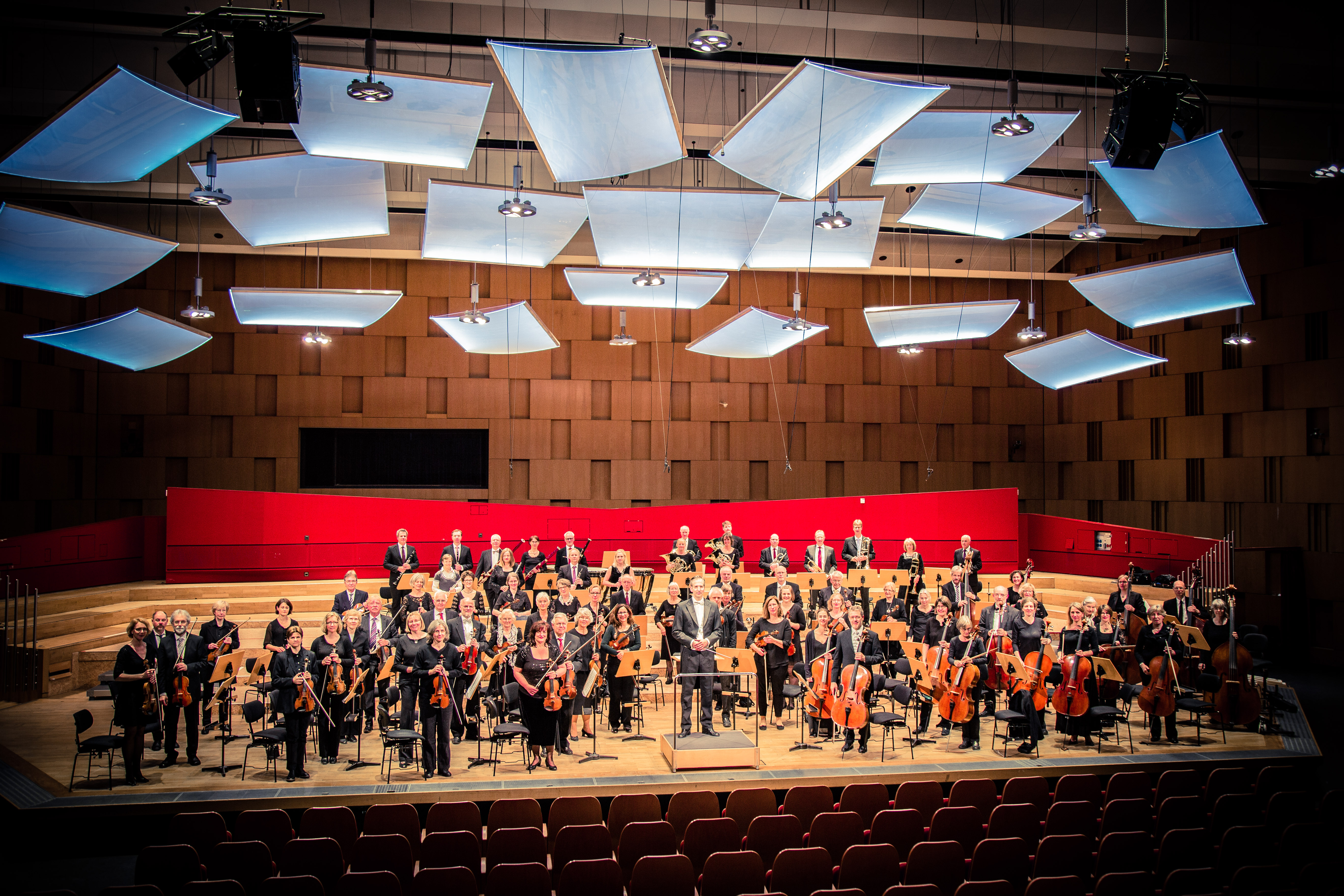 Die Hannoversche Orchestervereinigung e.V. am 06.Mai 2017 beim Konzert im großen Sendesaal des NDR in Hannover